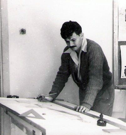 דיוקן נחום זולוטוב, שנות החמישים של המאה ה-20